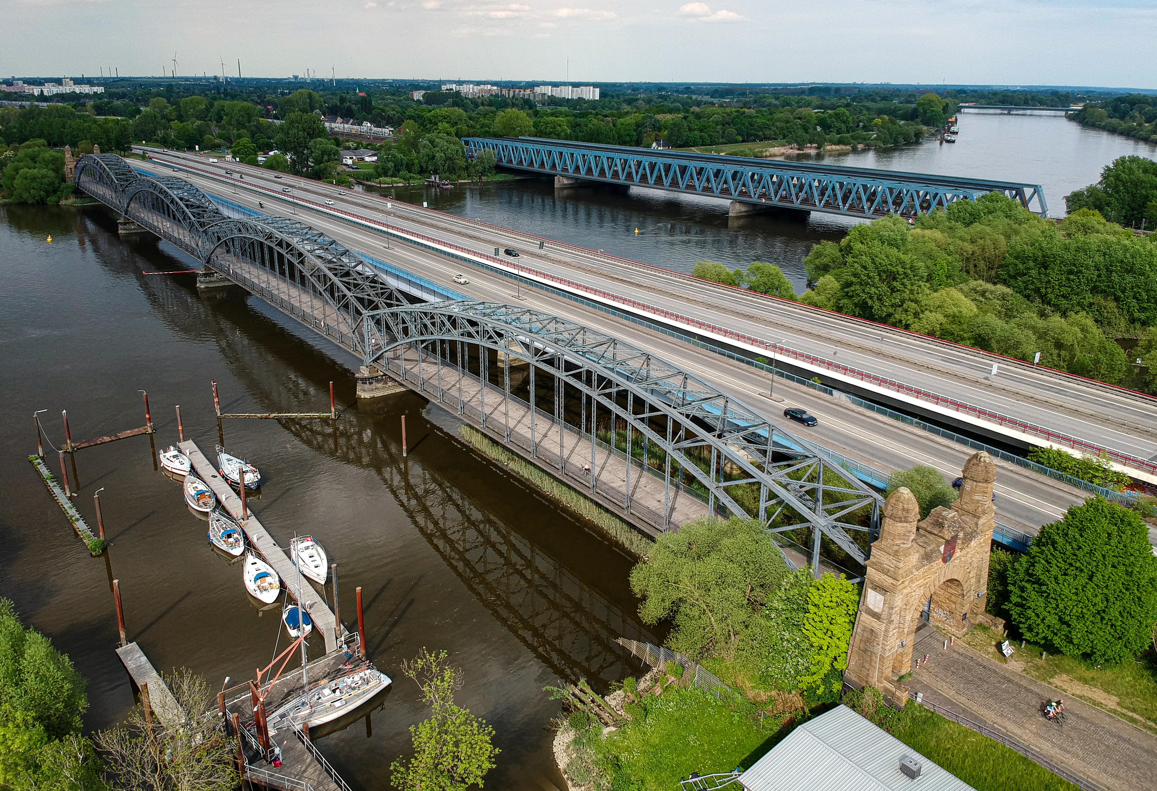 Harburger (Süder-)Elbbrücken, vorn die Alte Harburger Elbbrücke (mit Portal), dahinter die Brücke des 17. Juni, die Europabrücke und die Harburger Eisenbahnbrücke. Ganz im Hintergrund die Autobahnbrücke Moorwerder.